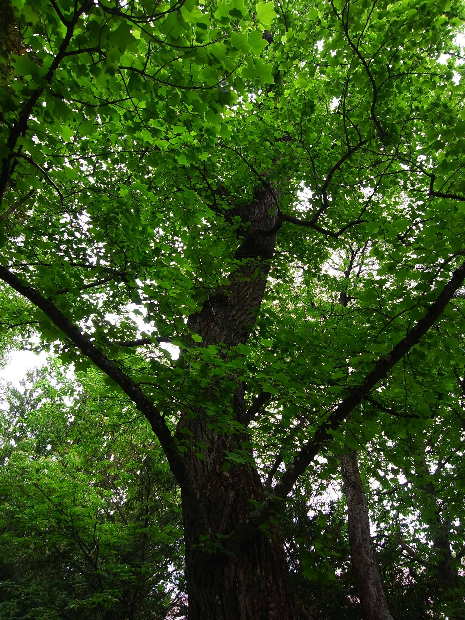 Ein Blick bin den Amerikanischen Tulpenbaum